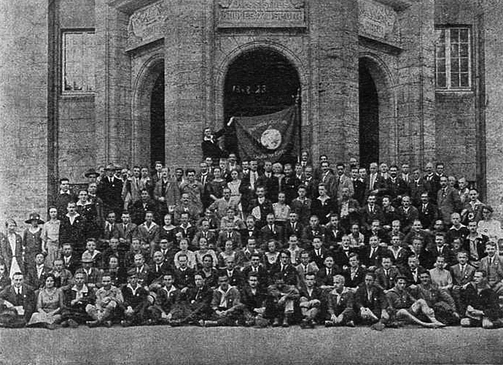 SAT-kongreso 1923 en Kaselo, Germanio. Komuna foto de la partoprenantoj.